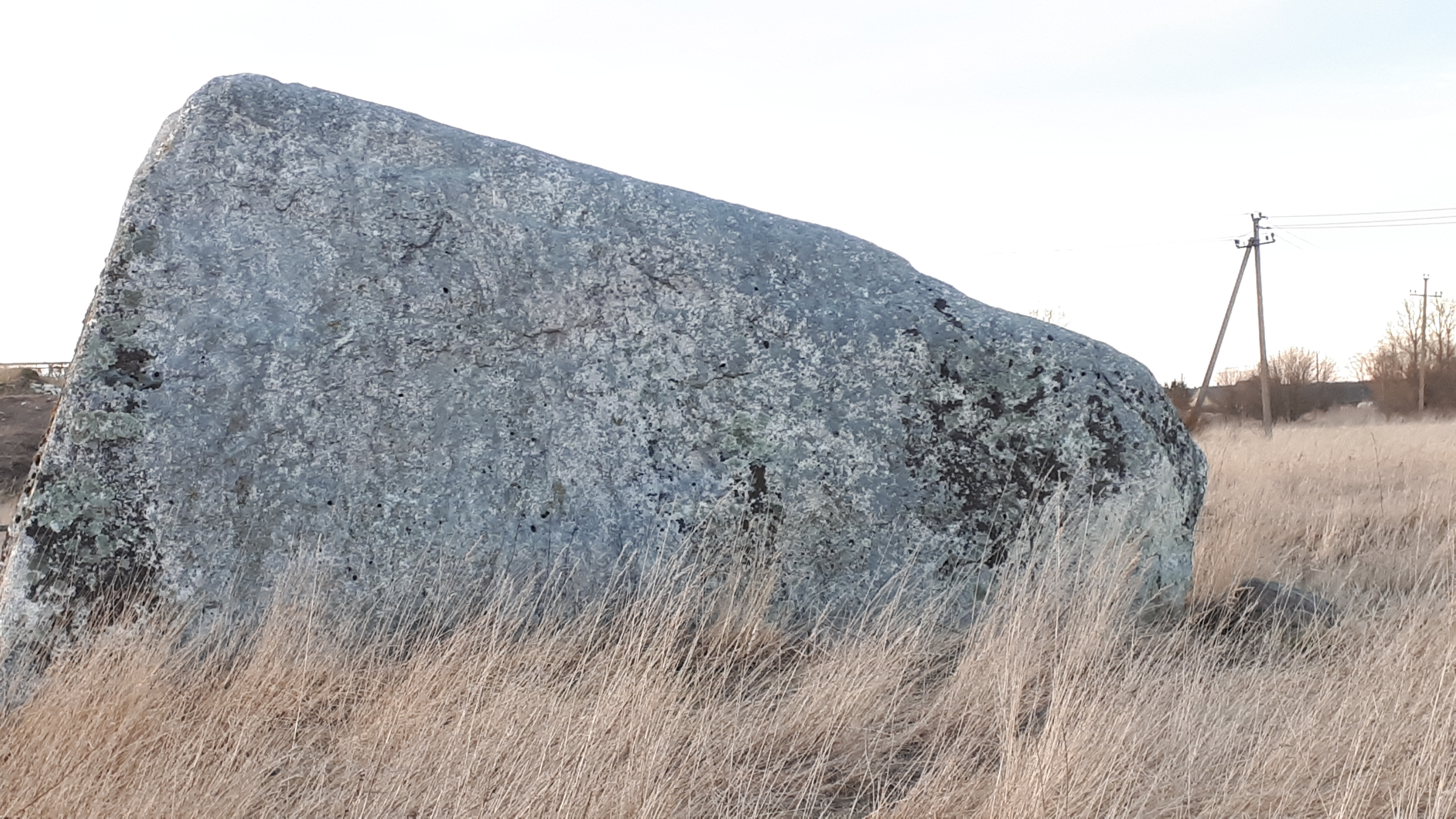 Kostivere liukivi